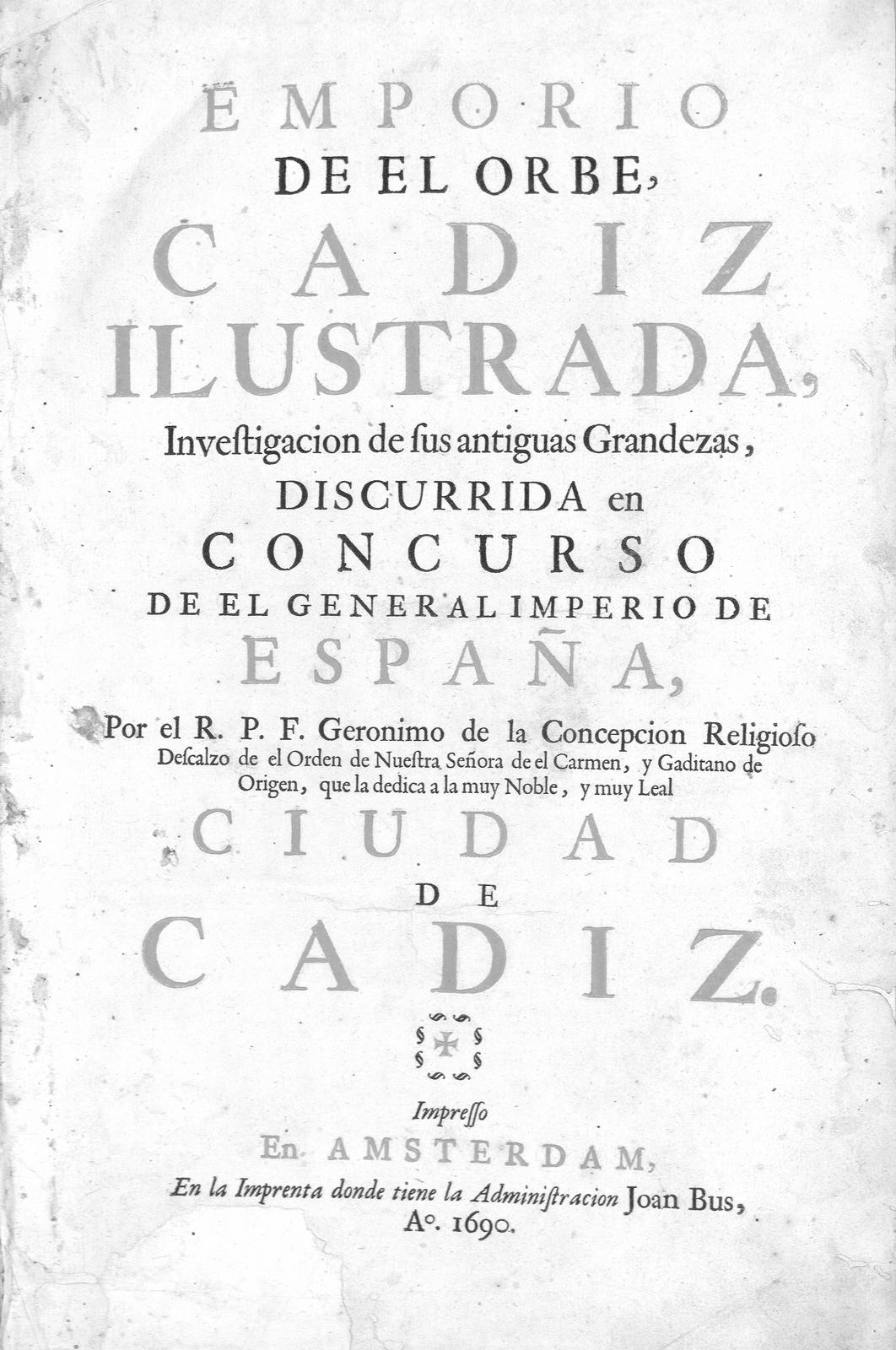 Portada del libro Emporio de el orbe, Cadiz ilustrada : investigacion de sus antiguas grandezas... / por... Geronimo de la Concepcion religioso descalzo de el orden de Nuestra Señora de el Carmen.